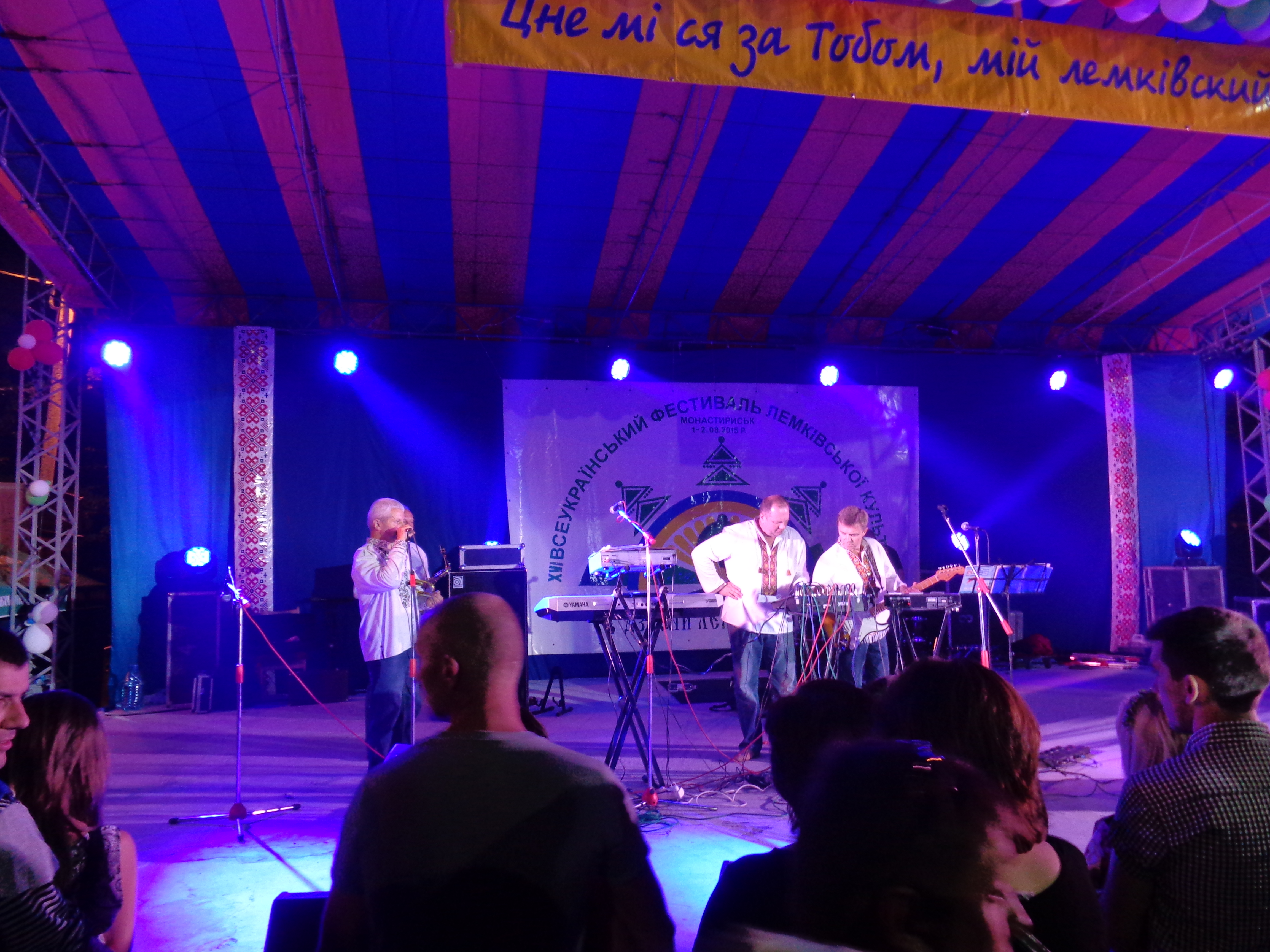 "Світозари" на фестивалі лемківської культури "Дзвони Лемківщини".